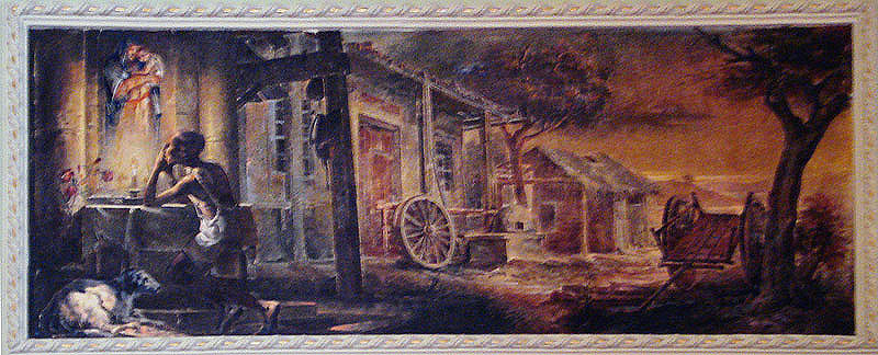 painel do Negrinho do Pastoreio, Palácio Piratini